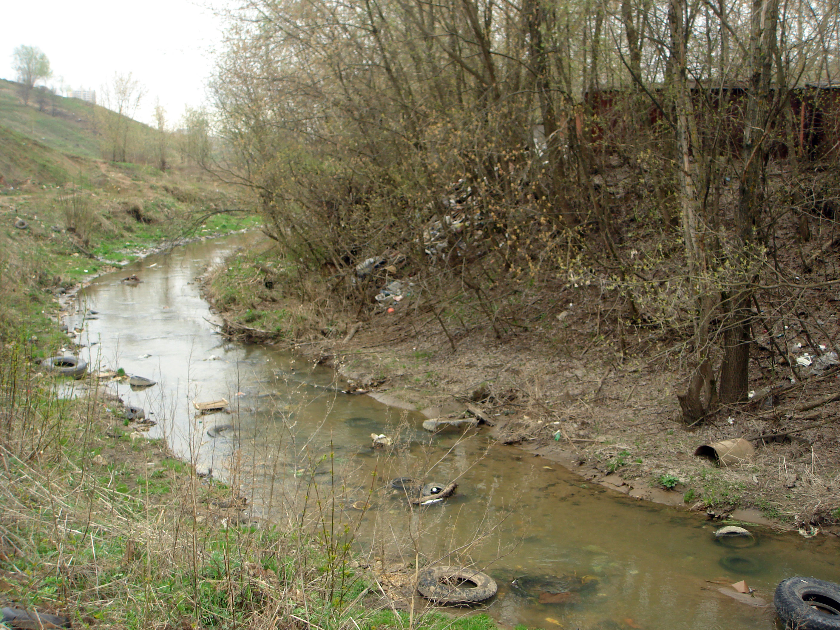 Река Старка (Кова)